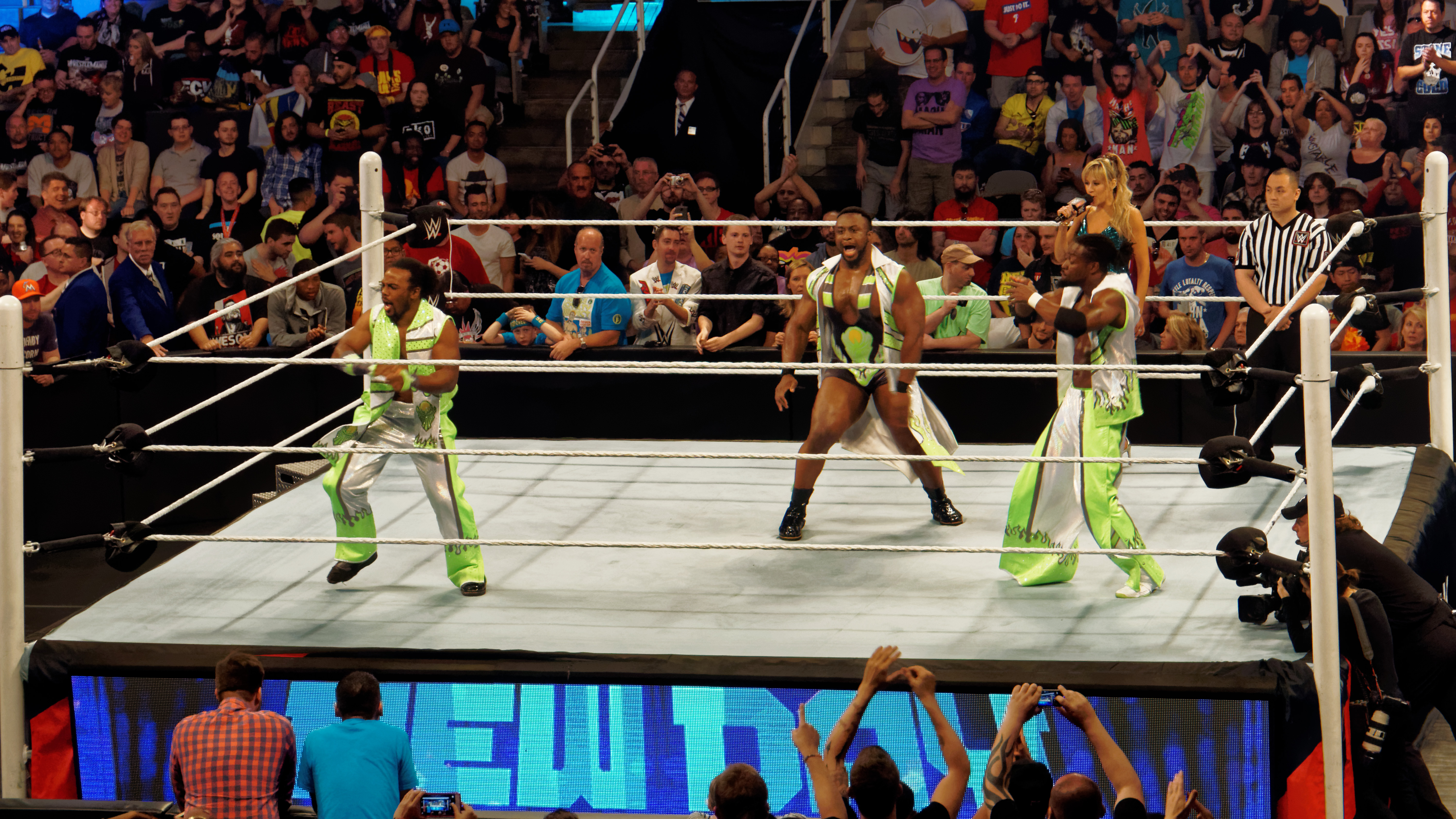 2015-03-30_17-38-12_ILCE-6000_0951_DxO